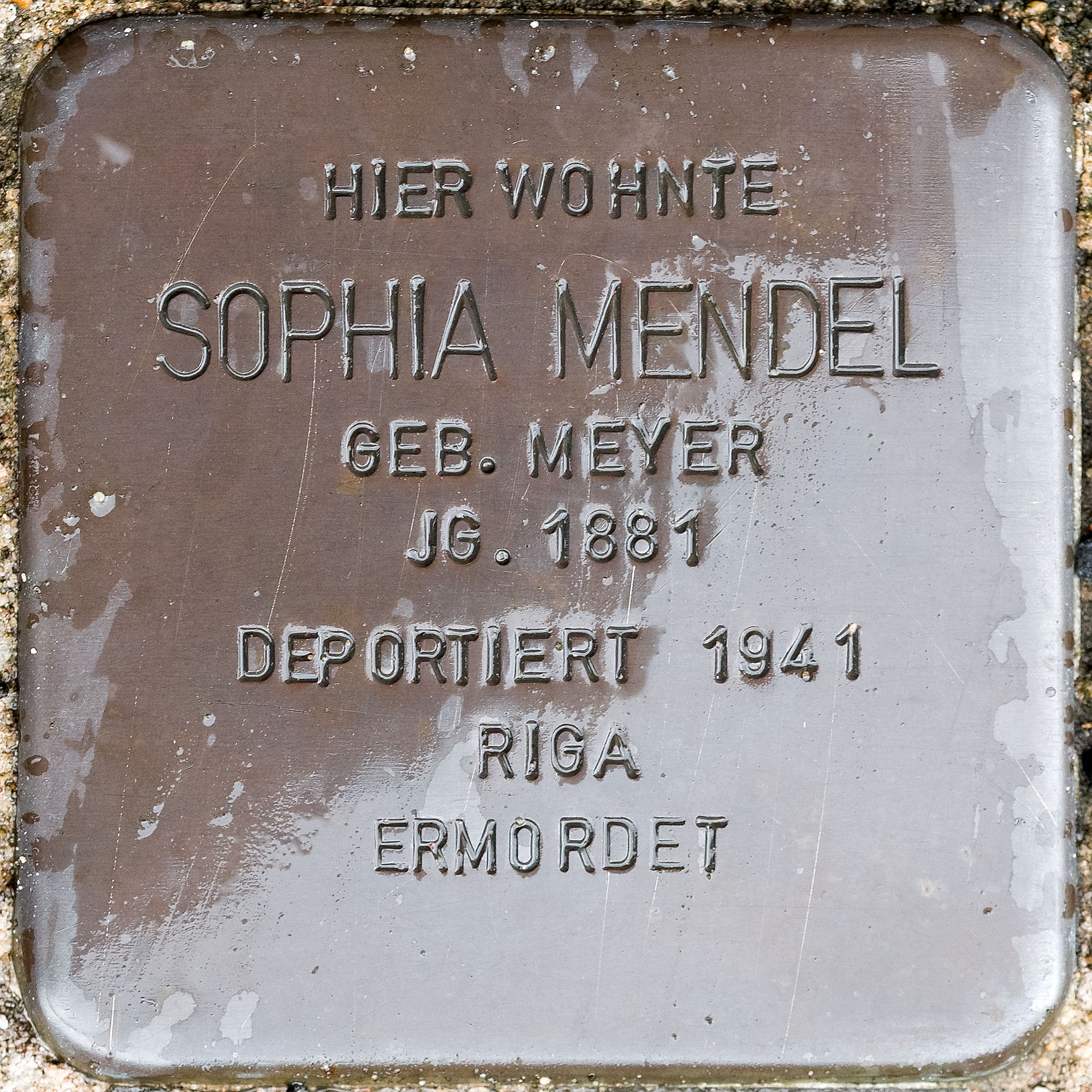 Stolpersteine Straelen: Mendel, Sophia